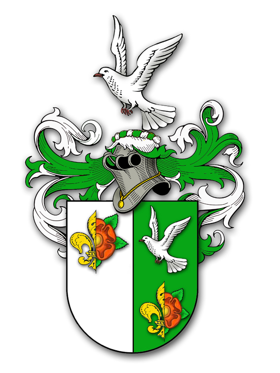 Brasão de Fernão de Loronha, senhor da Ilha de Fernando de Noronha.